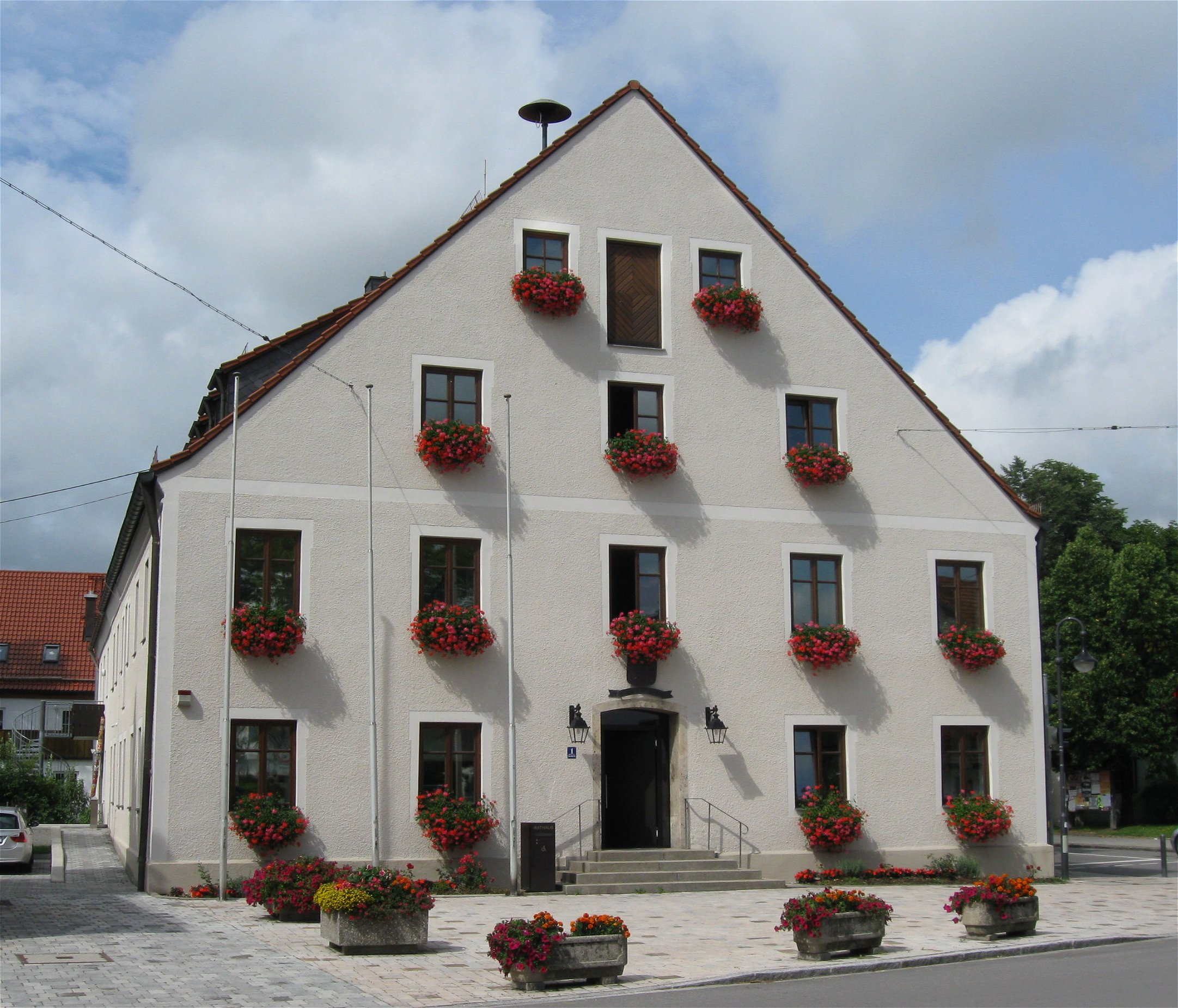 Pfarrer-Wenk-Platz 1; Rathaus, Ehemaliger Pfarrhof, dann Rathaus. Stattlicher Satteldachbau mit barocken Putzgliederungen, 1725. D-1-84-129-2